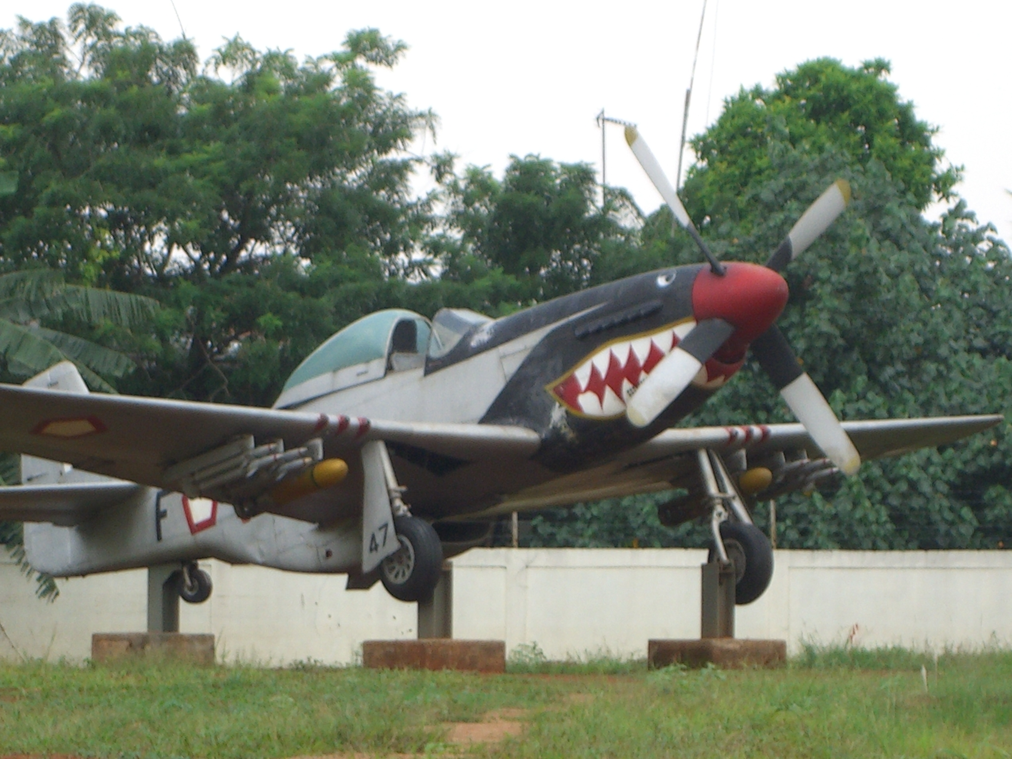 saya, sebagai pembuat foto ini menyatakan foto ini mempunyai lisensi domain umum . Bkusmono 02:48, 13 Juni 2007 (UTC)